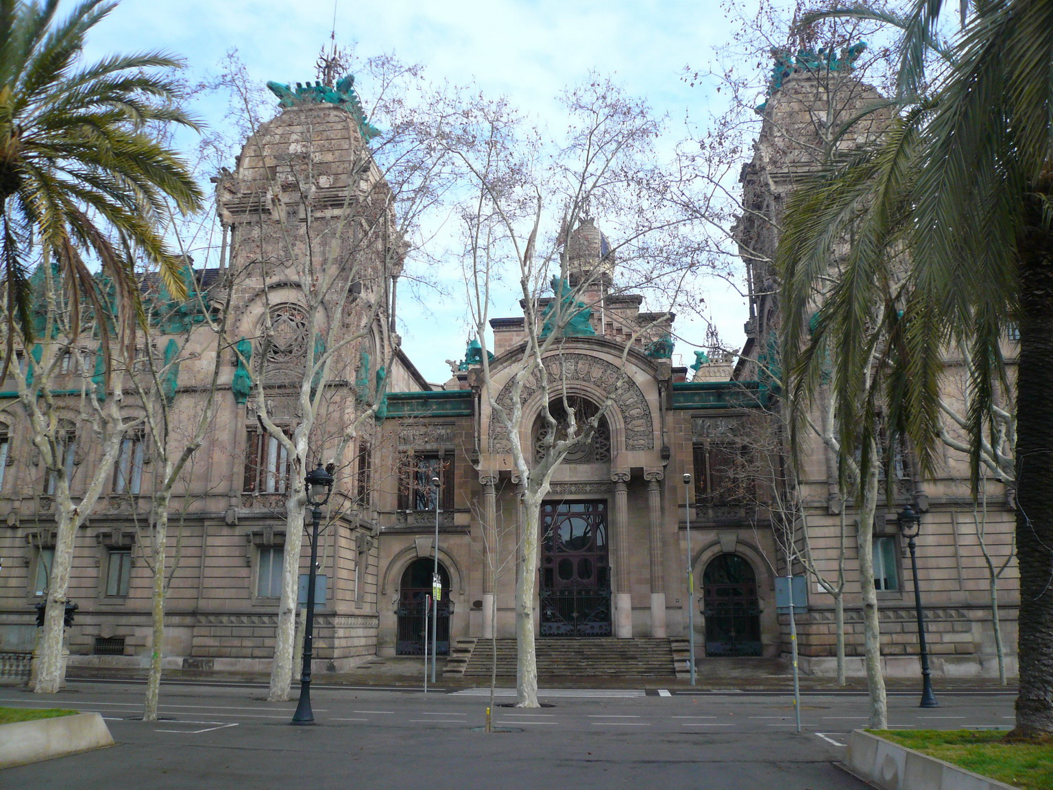 Palau de Justícia (Barcelona)